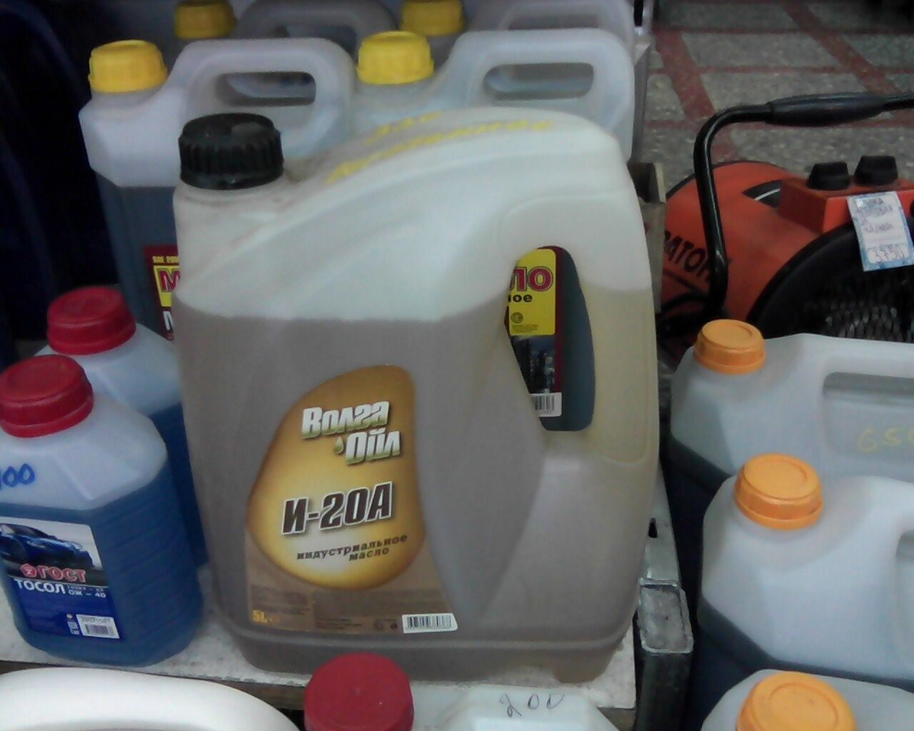 Индустриальное масло И-20А